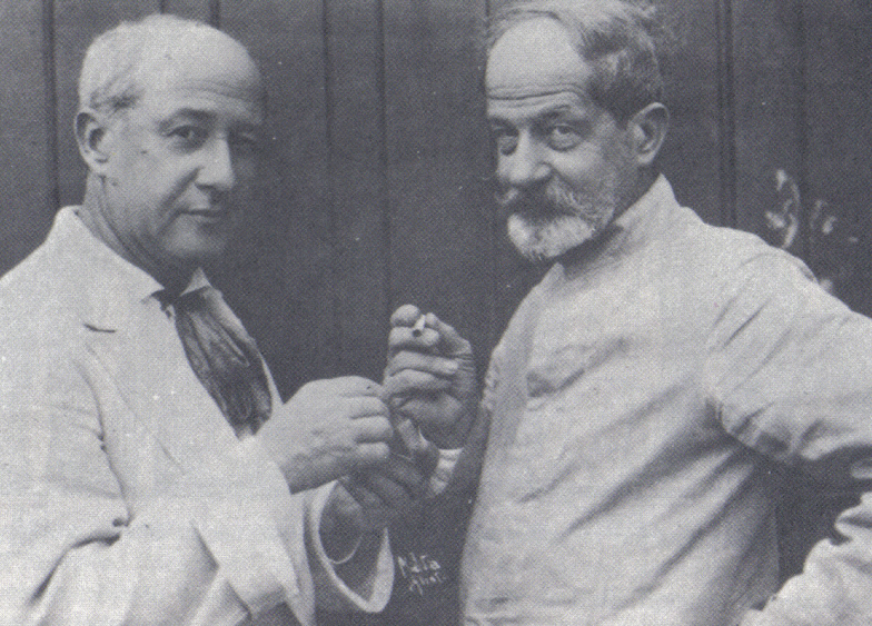 O pintor brasileiro Henrique Bernardelli e seu irmão, o escultor Rodolfo Bernardelli